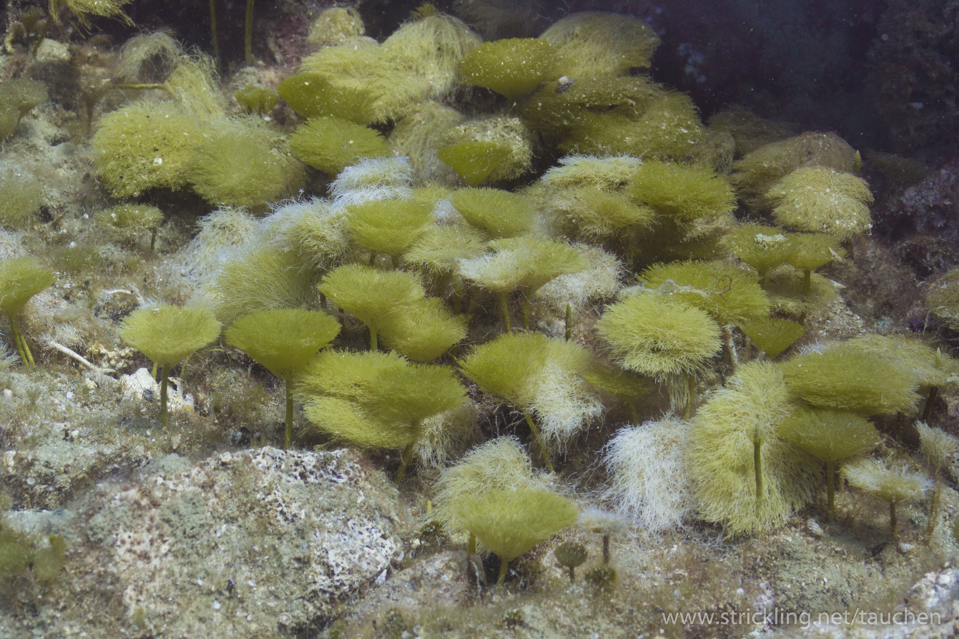 Rasierpinselalge (Penicillus capitatus)